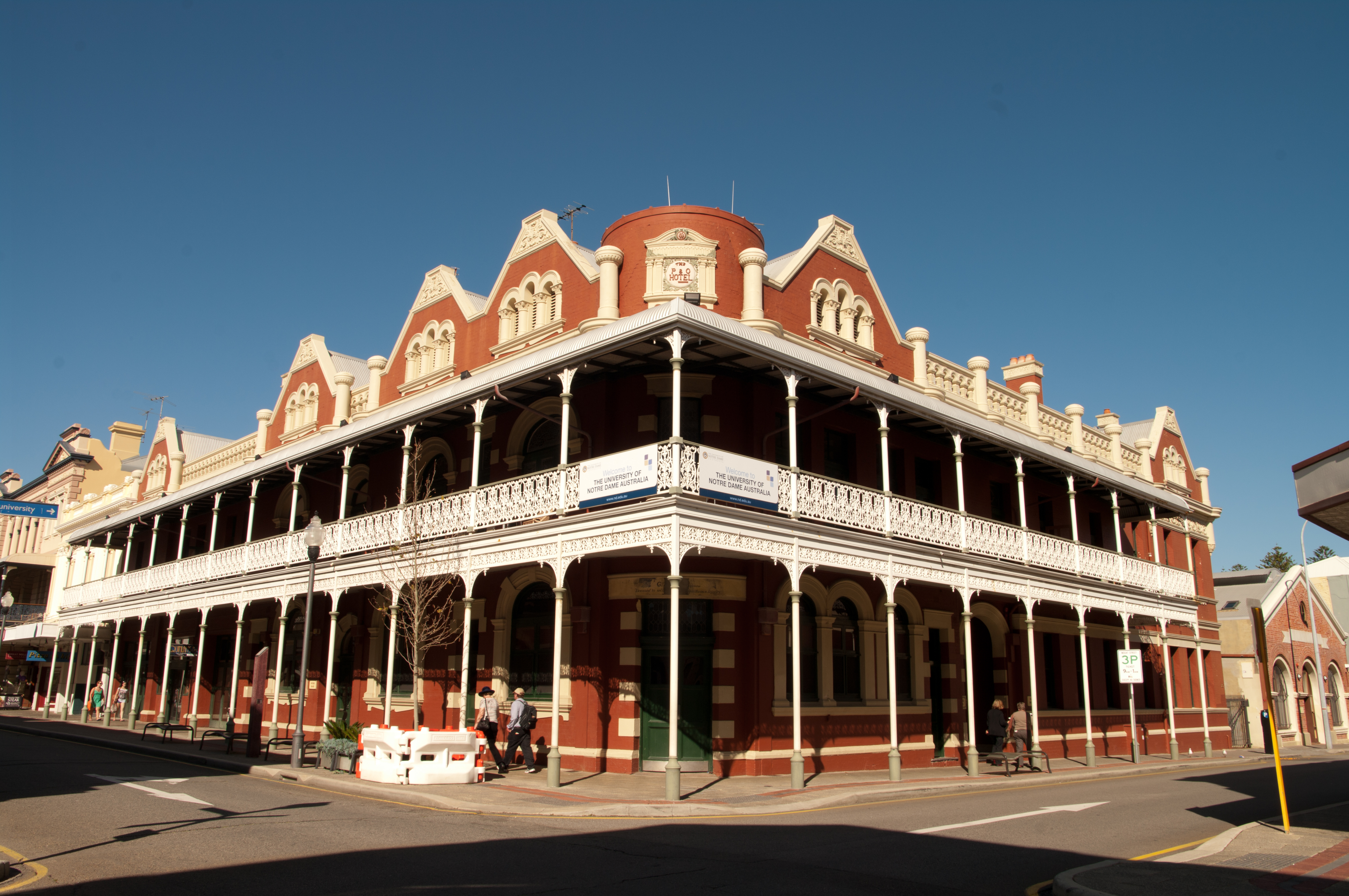 P&O Hotel